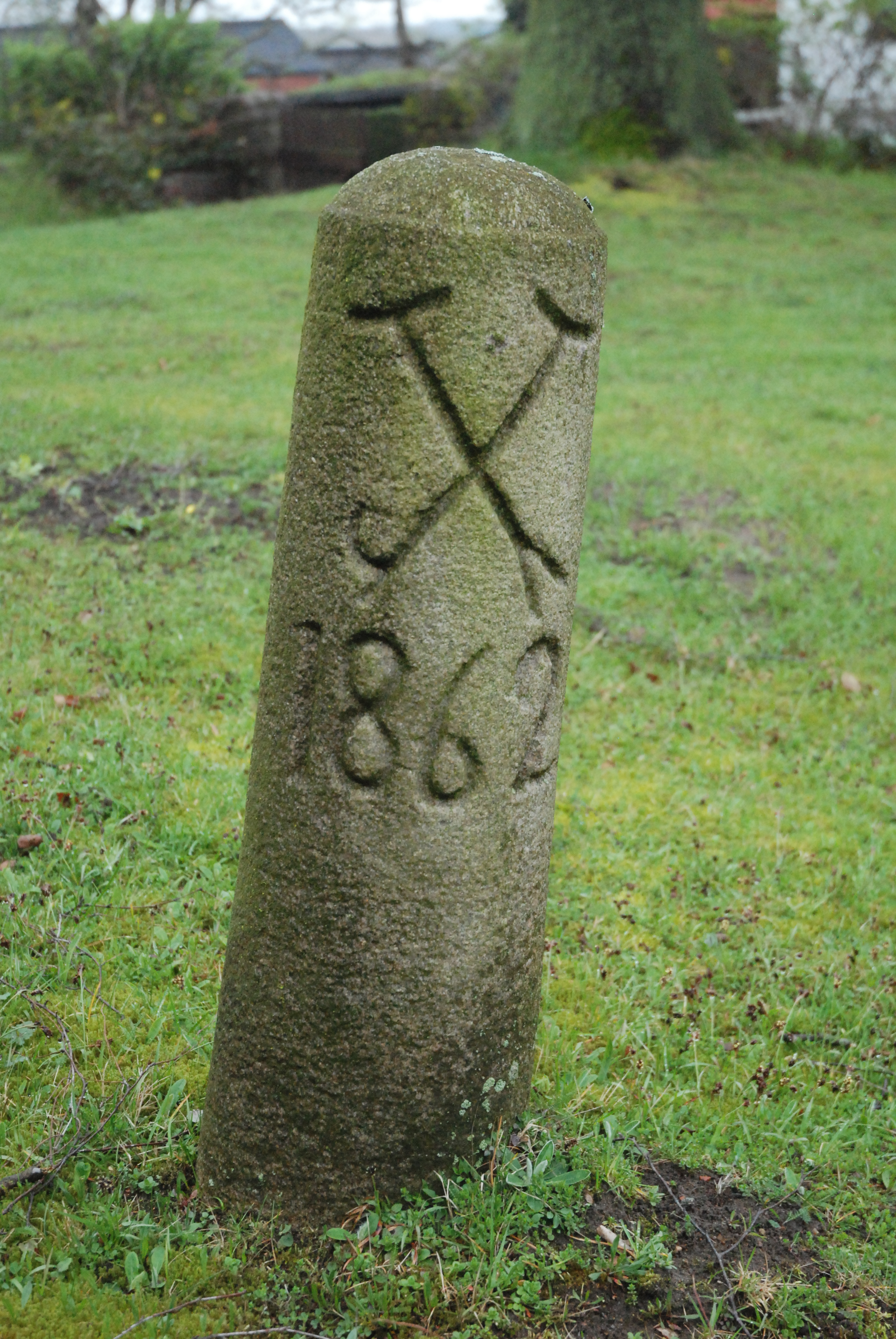 Stein der Stecknitzfahrer auf dem Kirchhofhügel in Berkenthin von 1862